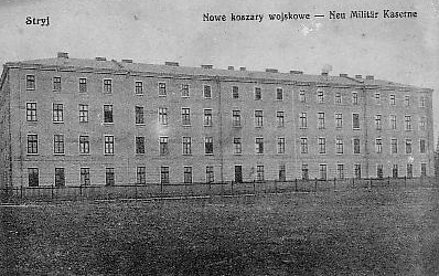 Infanterie-Kaserne in Stryj